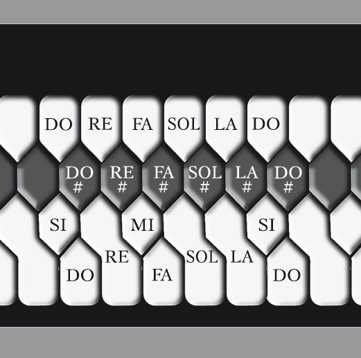 Аппликатура правой руки системы Кравцова